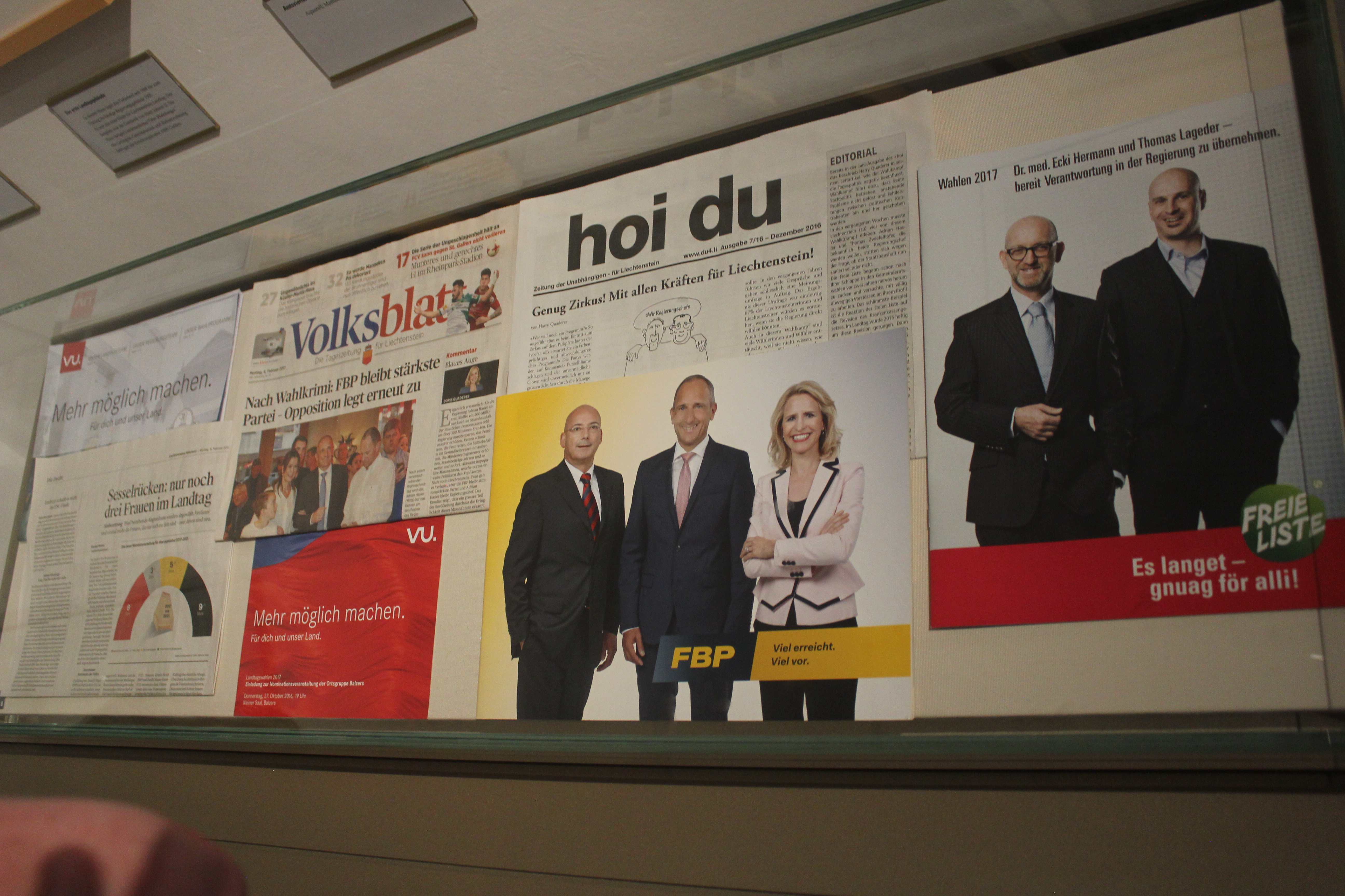 Eine Vitrine im Liechtensteinischen Landesmuseum zeigt ausgewählte Parteizeitungen sowie Werbeflyer der Parteien VU, FBP und Freie Liste.